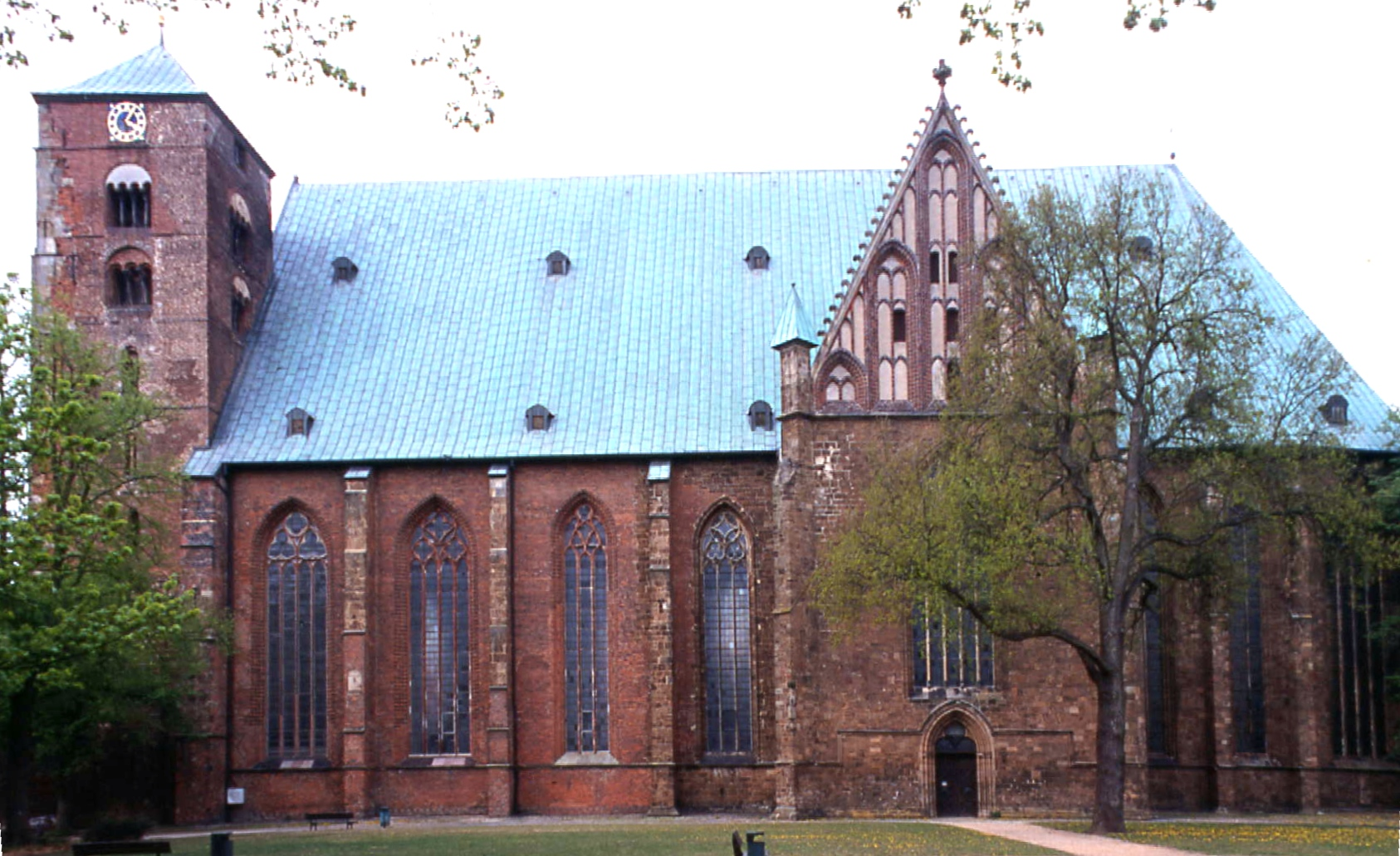 Verden an der Aller, Dom. Ansicht von Süd. Eigenes Photo, März 2003.